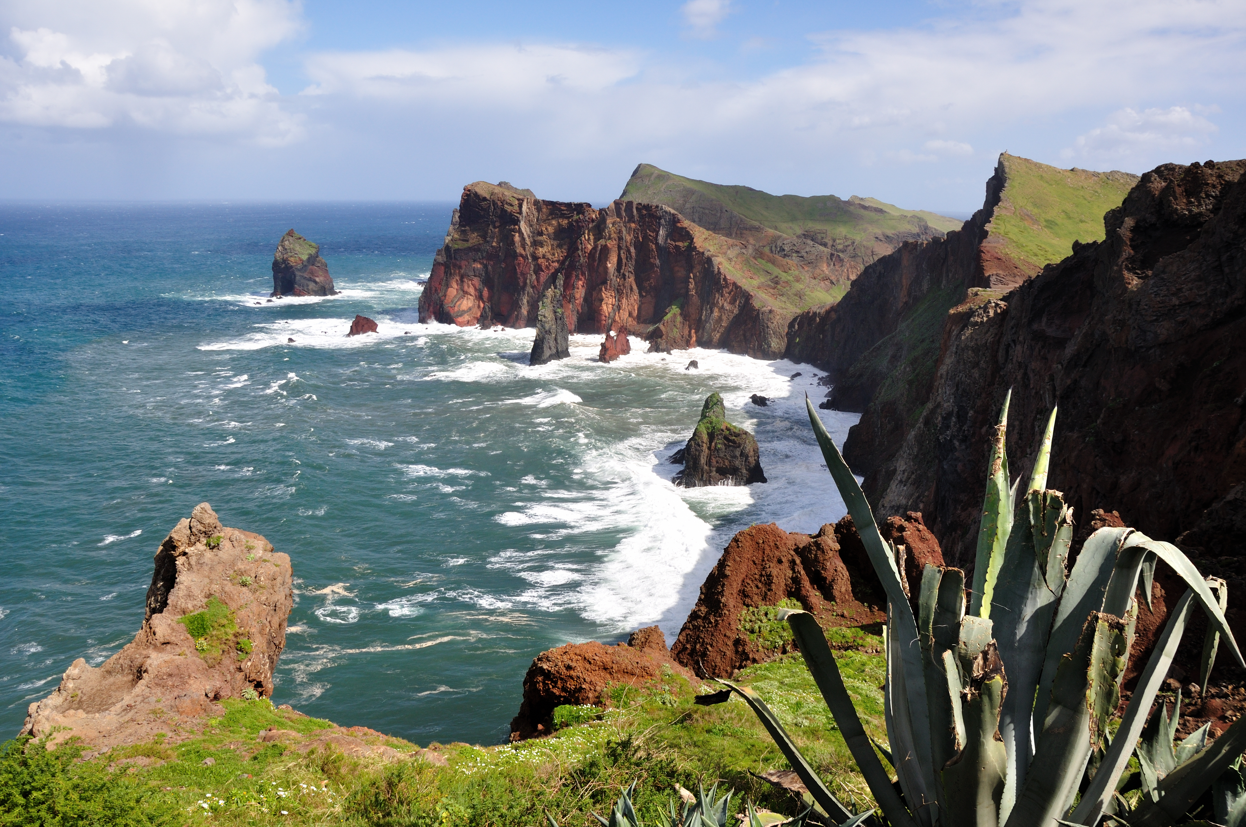 Portugal, Ponta de São Lourenço